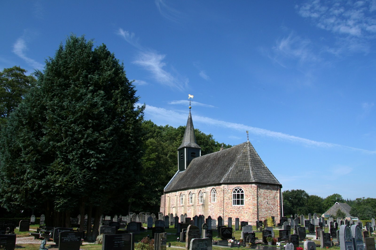 Kerkje van Wijnjewoude- Duurswoude.